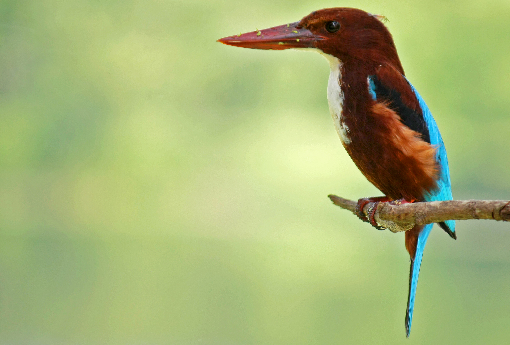 மீன் கொத்தி - தமிழ்நாட்டில்/இலங்கையில் காணப்படும் பறவைகள்